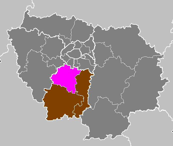 Maps of arrondissements and cantons of France: Département de l Essonne - Arrondissement de Palaiseau.PNG (Région Île-de-France)